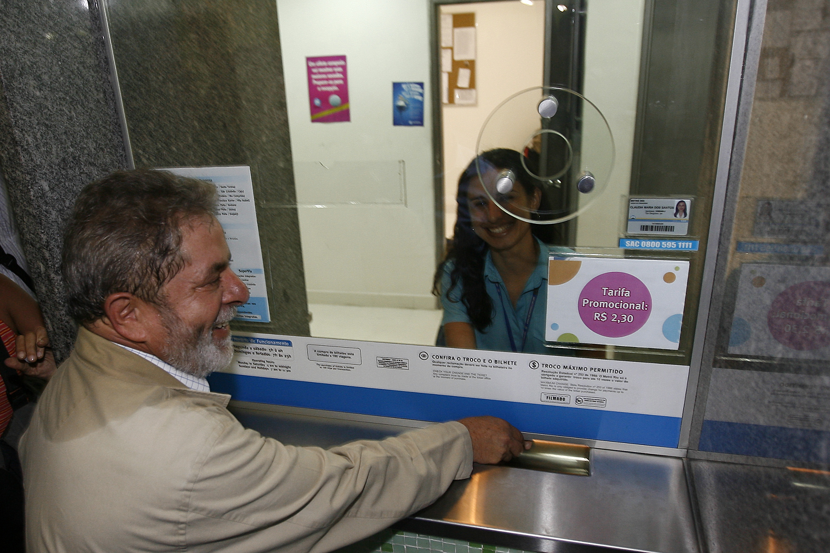 Rio de Janeiro - O presidente Luiz Inácio Lula da Silva na bilheteria da Estação Maracanã do metrô, antes de embarcar para a viagem inaugural do 13º trem urbano do Rio.